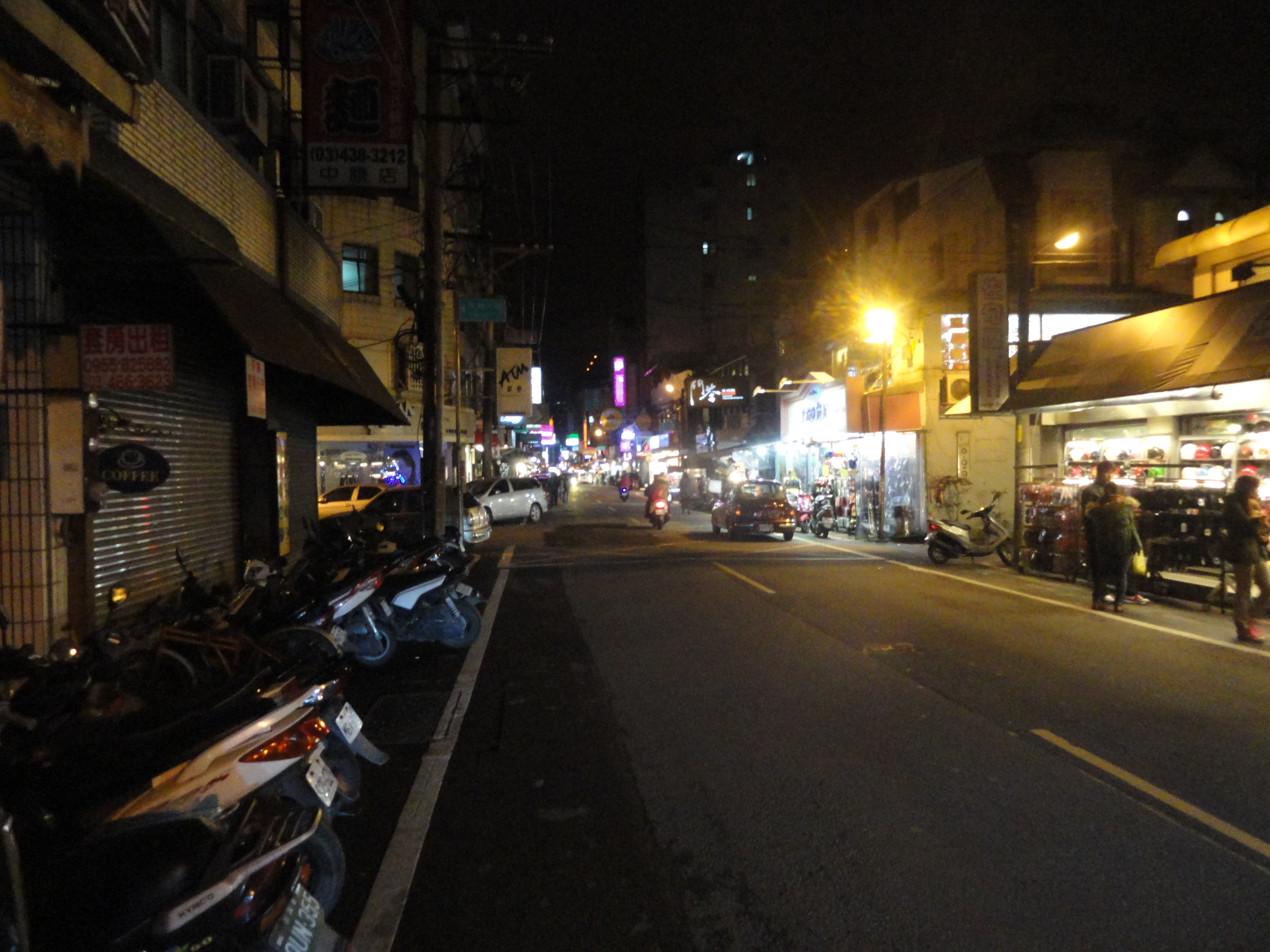 中文（中国大陆）: 中原夜市一角